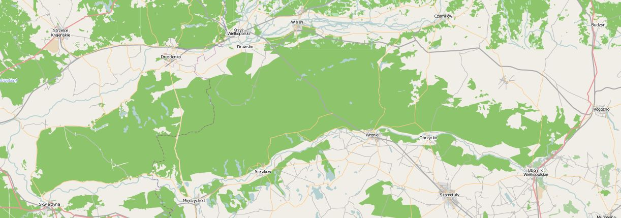 Mapa Pyszczy Noteckiej